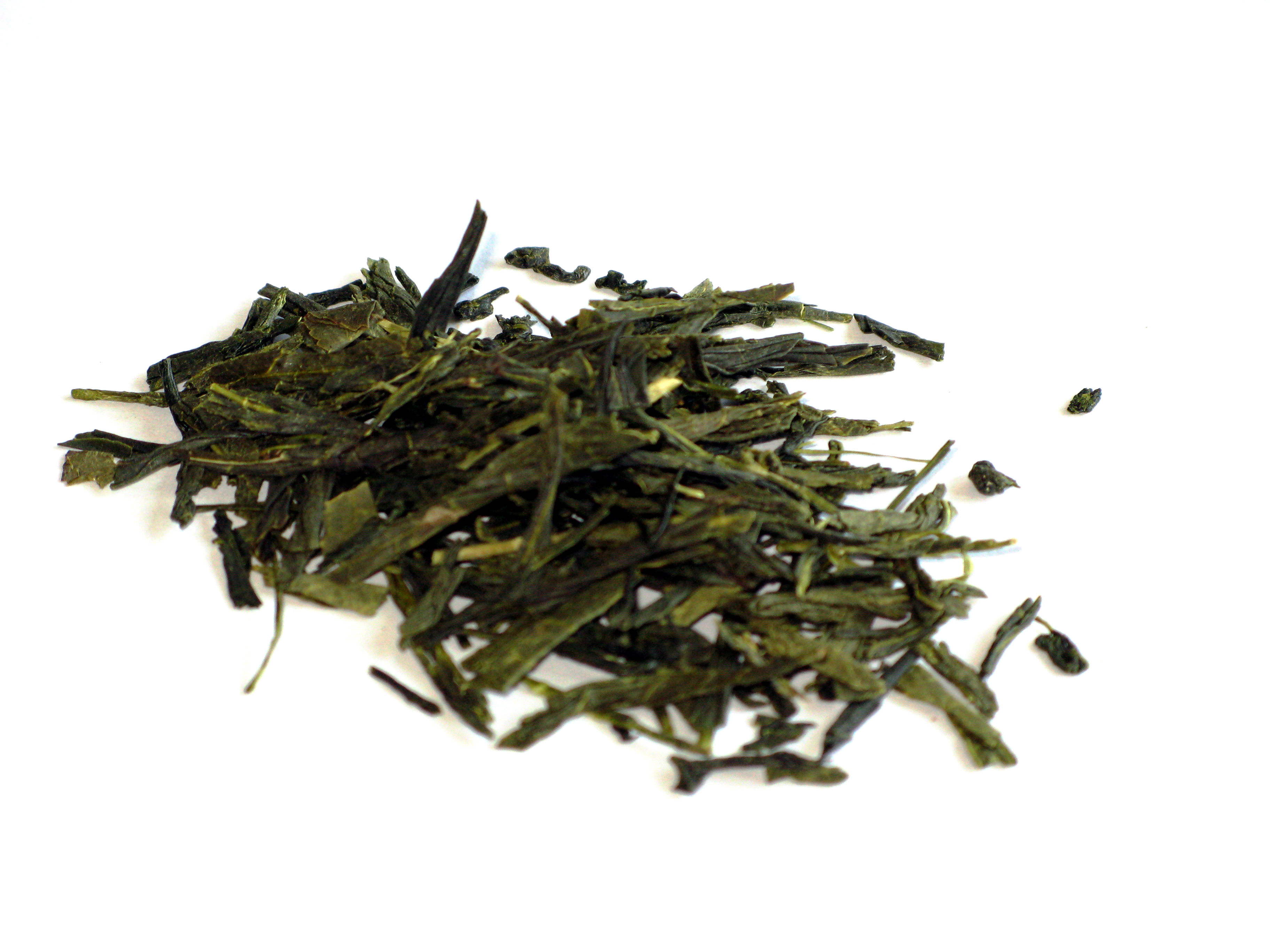 Bancha tamakien tea